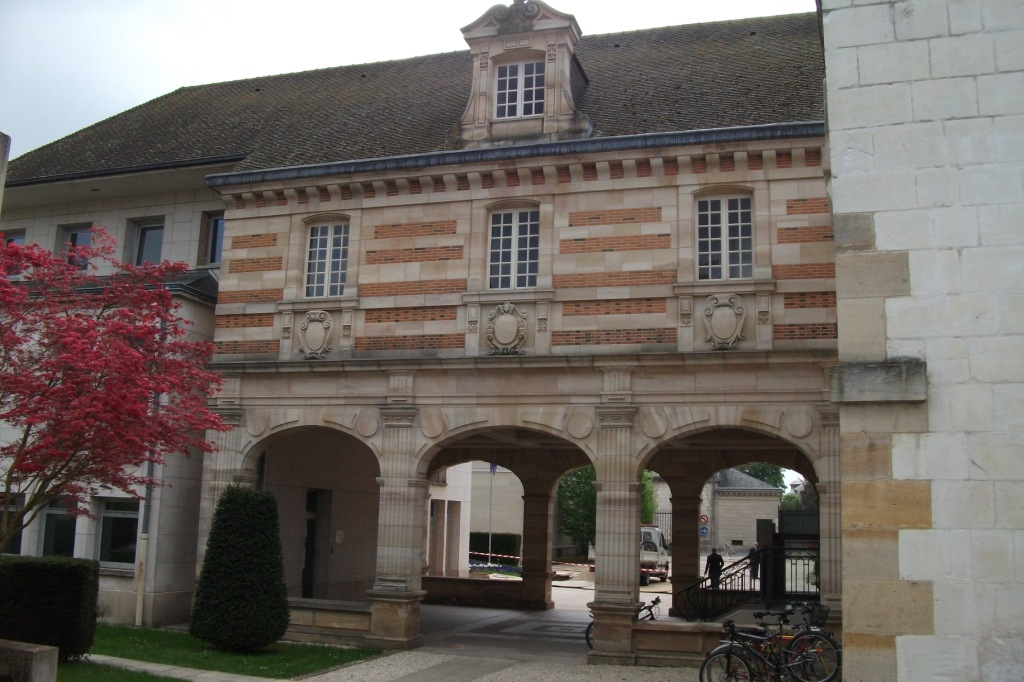 Conseil général de la Marne, vue du la cour de la rue de Jessaint ancient couvent des soeurs de la congrégation Notre-Dame dit aussi couvent Ste-Marie.